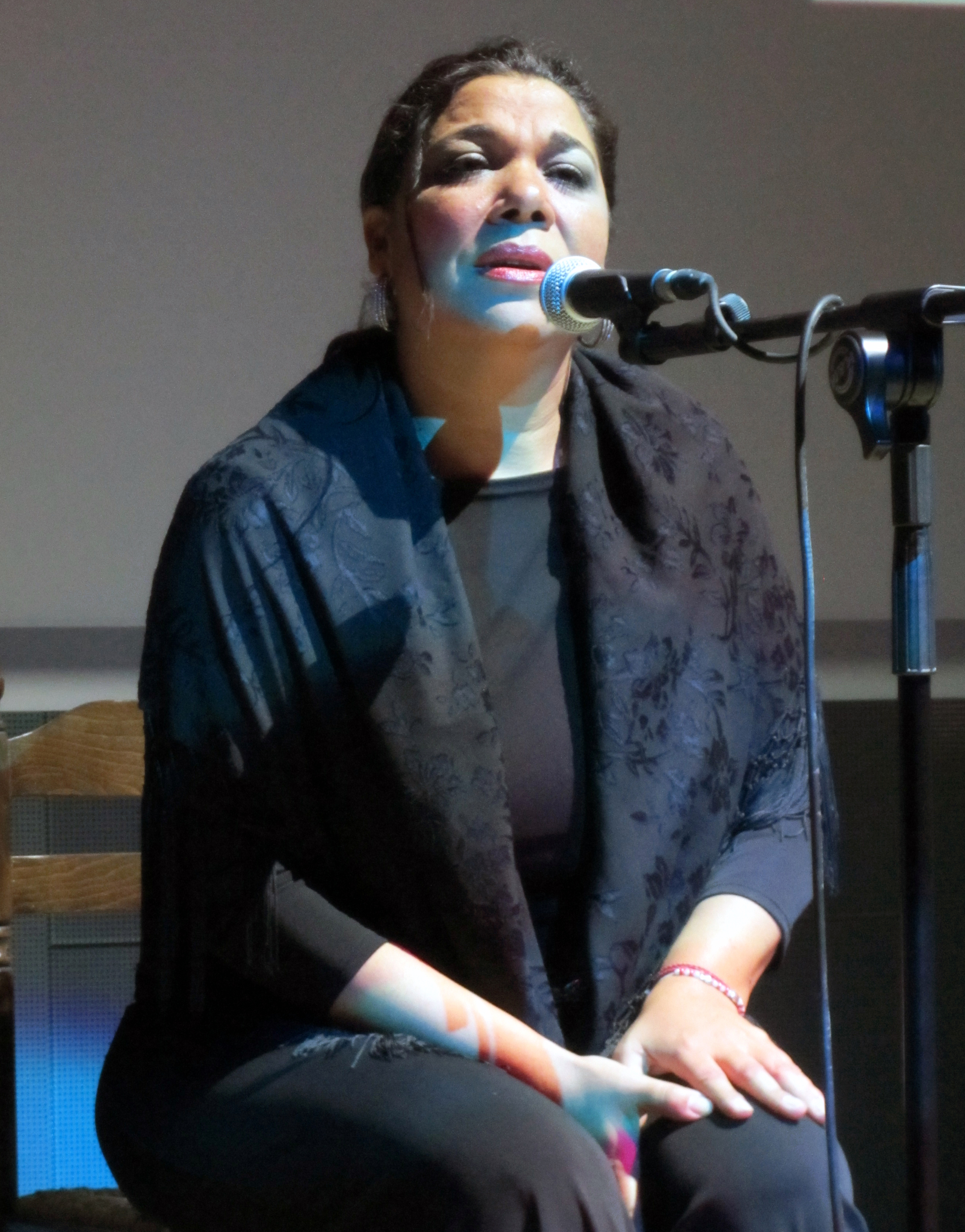 Fotografía de Tomasa La Macanita tomada en la Presentación Presentación del Festival de Fès en Barcelona